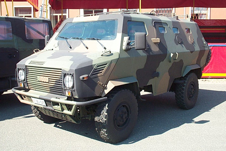 VM90 versione Protetto dell'Esercito italiano.